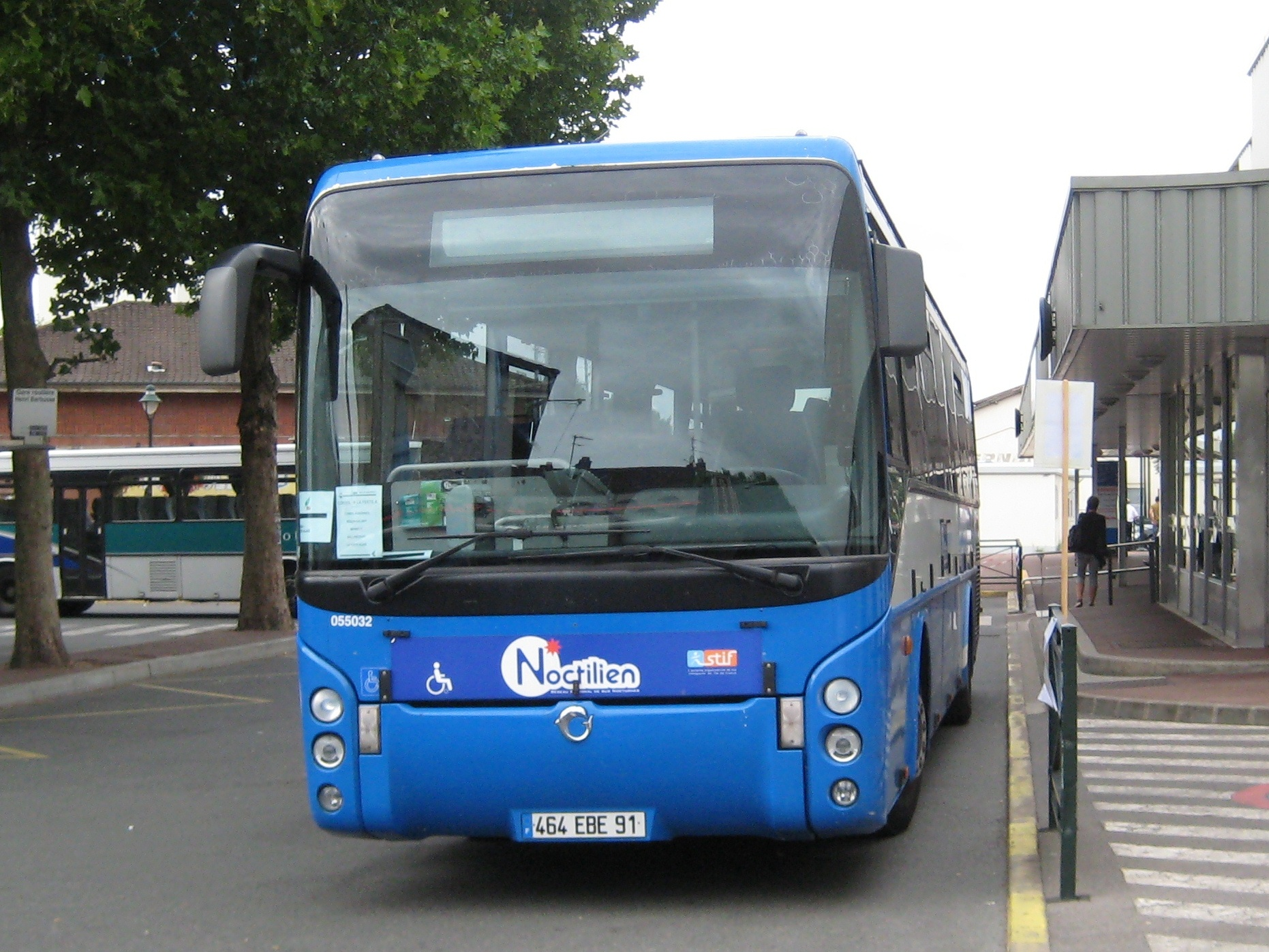 Car Noctilien (Transilien) assurant la liaison Corbeil-Essonnes - La Ferté-Alais en aout 2010. Corbeil-Essonnes. Essonne. France.